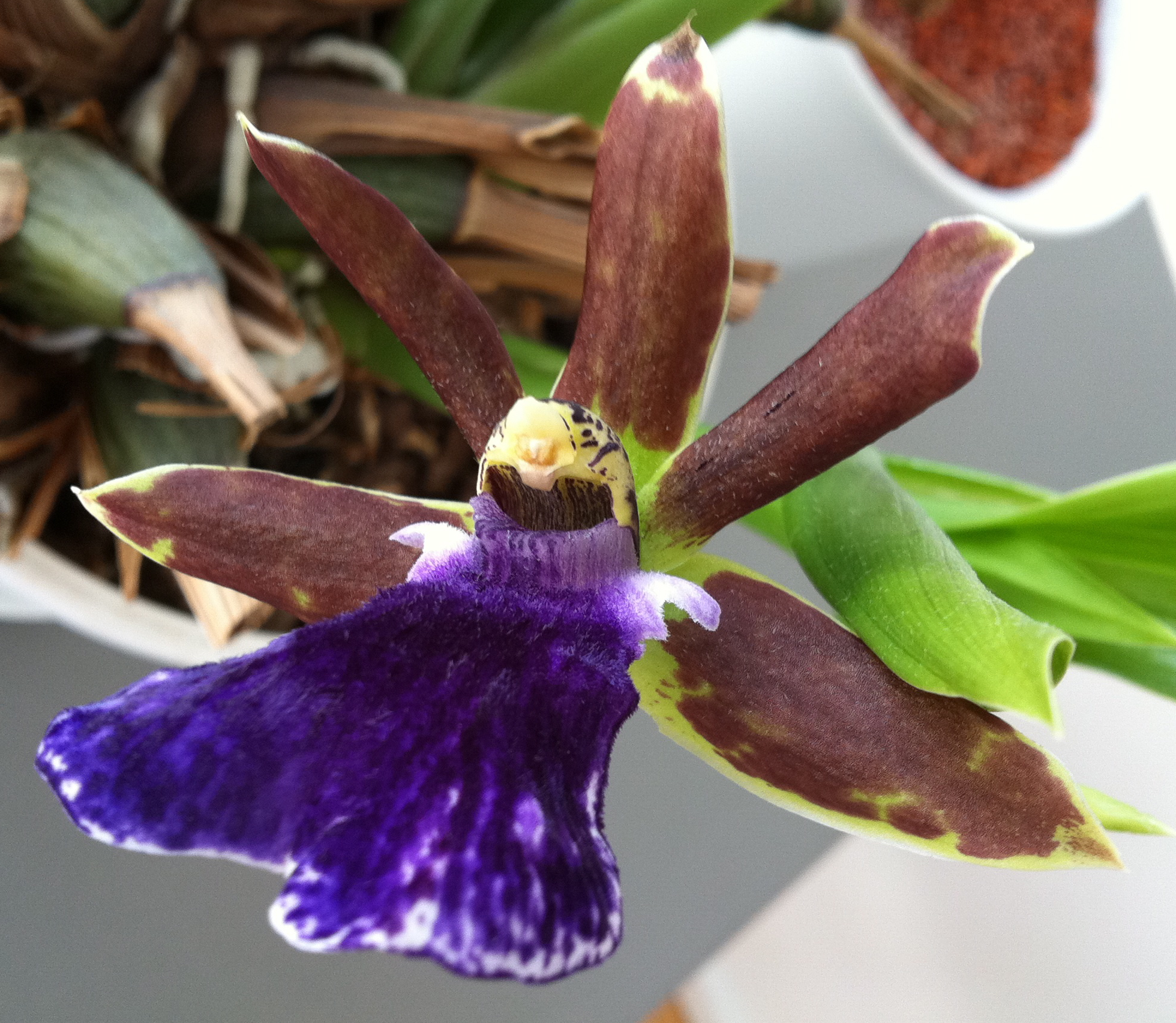 duftende Zygopetalumhybride Arthur Elle Bright and Blue